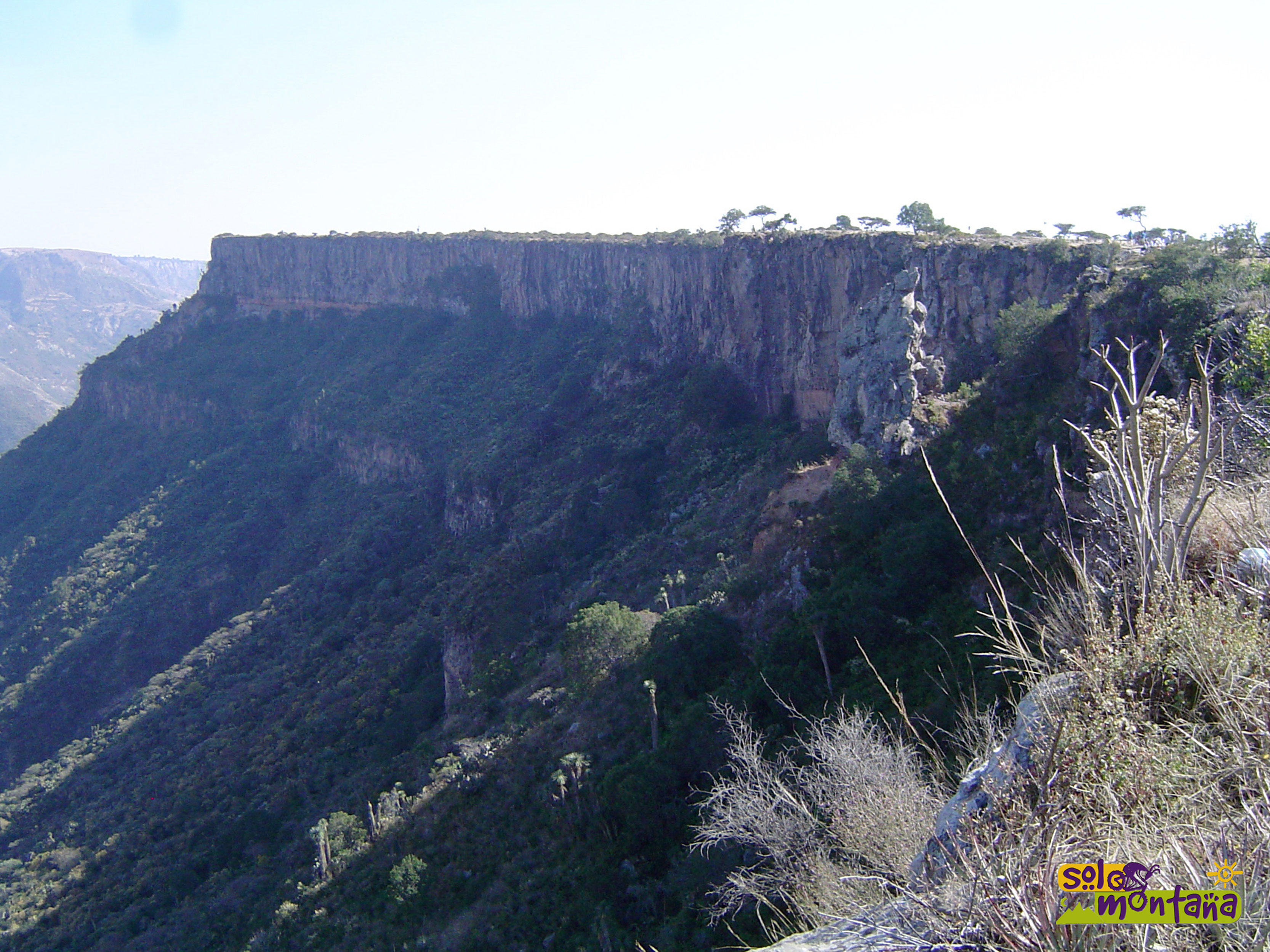 Peña del Aire, Huasca